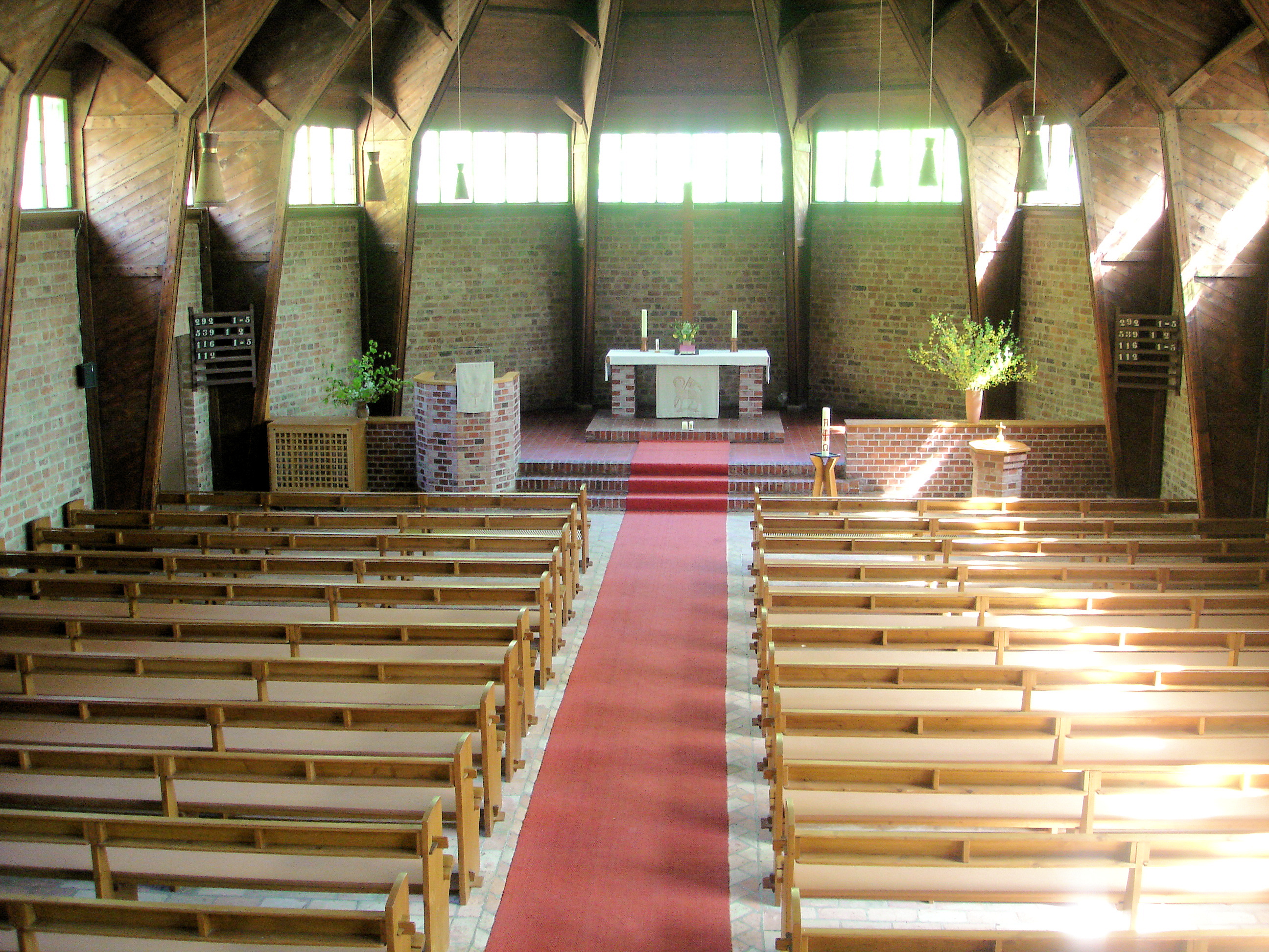 Blick in das Kirchenschiff der Johanniskirche in Rostock